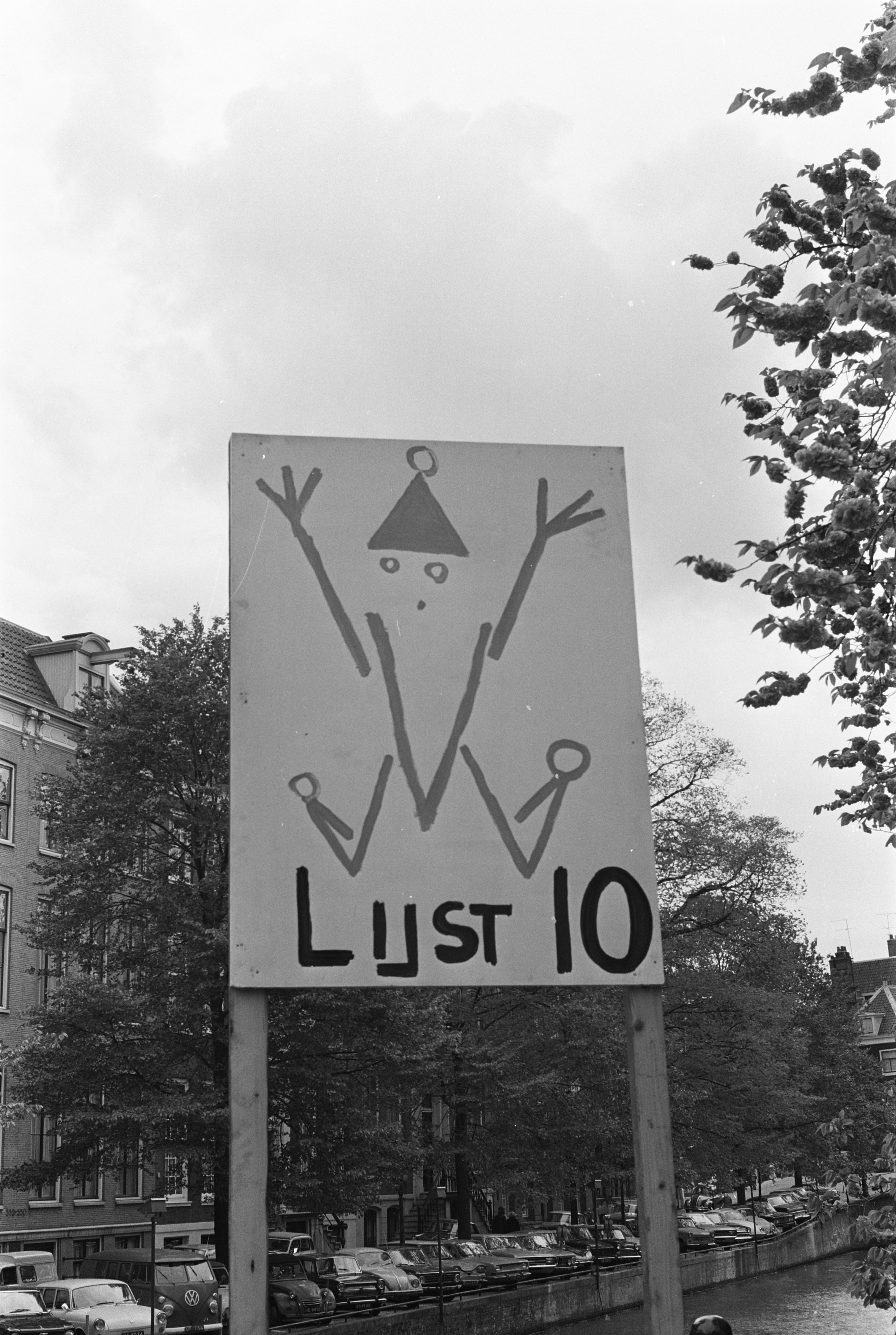 Collectie / Archief : Fotocollectie Anefo Reportage / Serie : [ onbekend ] Beschrijving : Verkiezingsbord voor Gemeenteraad, Amsterdam van Kabouterpartij op brug Datum : 21 mei 1970 Locatie : Amsterdam, Noord-Holland Trefwoorden : verkiezingsborden Persoonsnaam : Kabouterpartij Fotograaf : Croes, Rob C. / Anefo Auteursrechthebbende : Nationaal Archief Materiaalsoort : Negatief (zwart/wit) Nummer archiefinventaris : bekijk toegang 2.24.01.05 Bestanddeelnummer : 923-5368